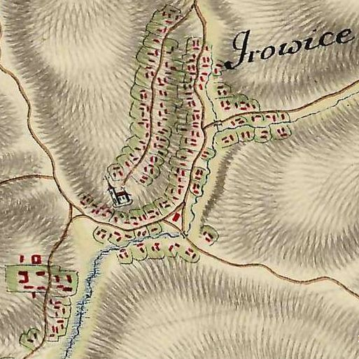 Ober Irowice oder Ihrowica, Josephinische Landesaufnahme 1769-1787